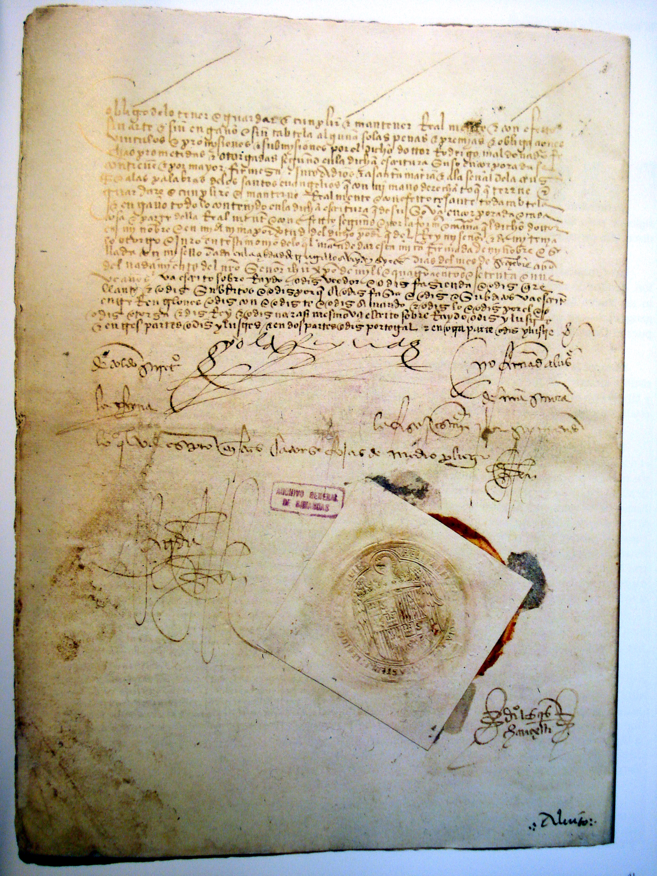 Ratificación por Isabel I de Castilla de las paces firmadas con Portugal (Tratado de Alcaçovas) para poner fin a la Guerra de Sucesión Castellana. Firmada en Trujillo el 27 de septiembre de 1479. Conservada en el Archivo General de Simancas (España).